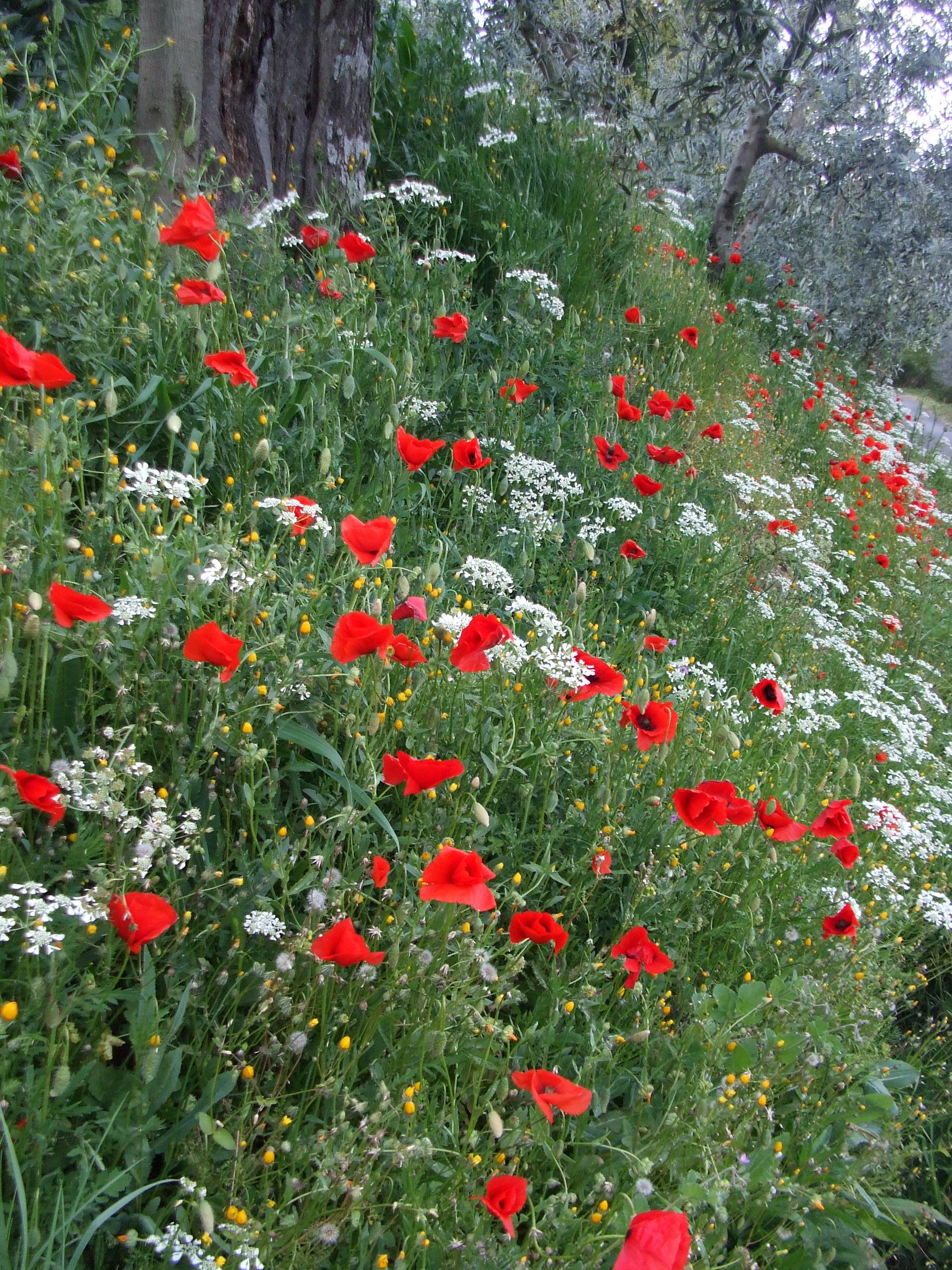 Senaia primavera